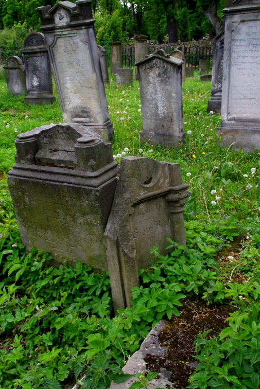 Kamienna Góra, ul. Katowicka - cmentarz żydowski, 1 poł. XIX w. (zabytek nr rejestr 980/J z 4.09.1989)